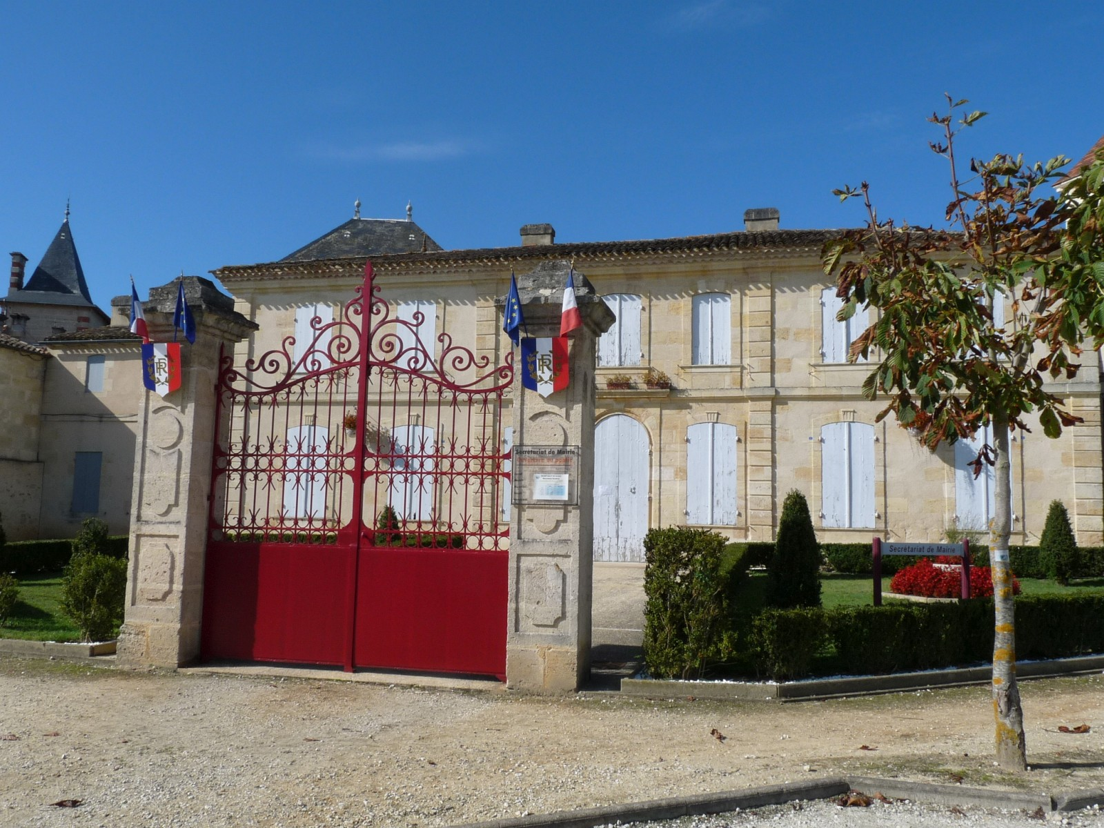 Mairie de Saint-Christoly-de-Blaye, Gironde, France